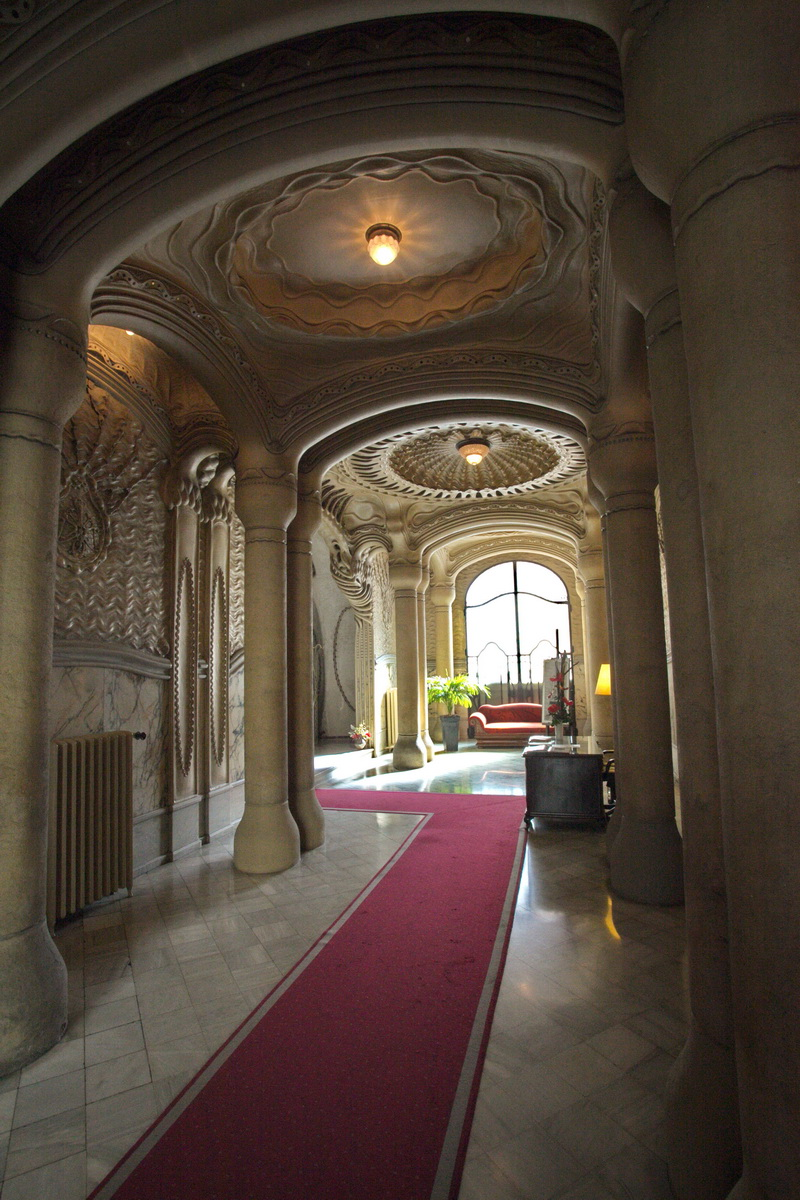 Vestíbul de la casa Sayrach